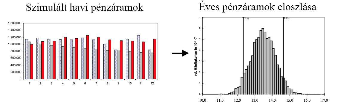 Szimuált Pénzáramok CFaR